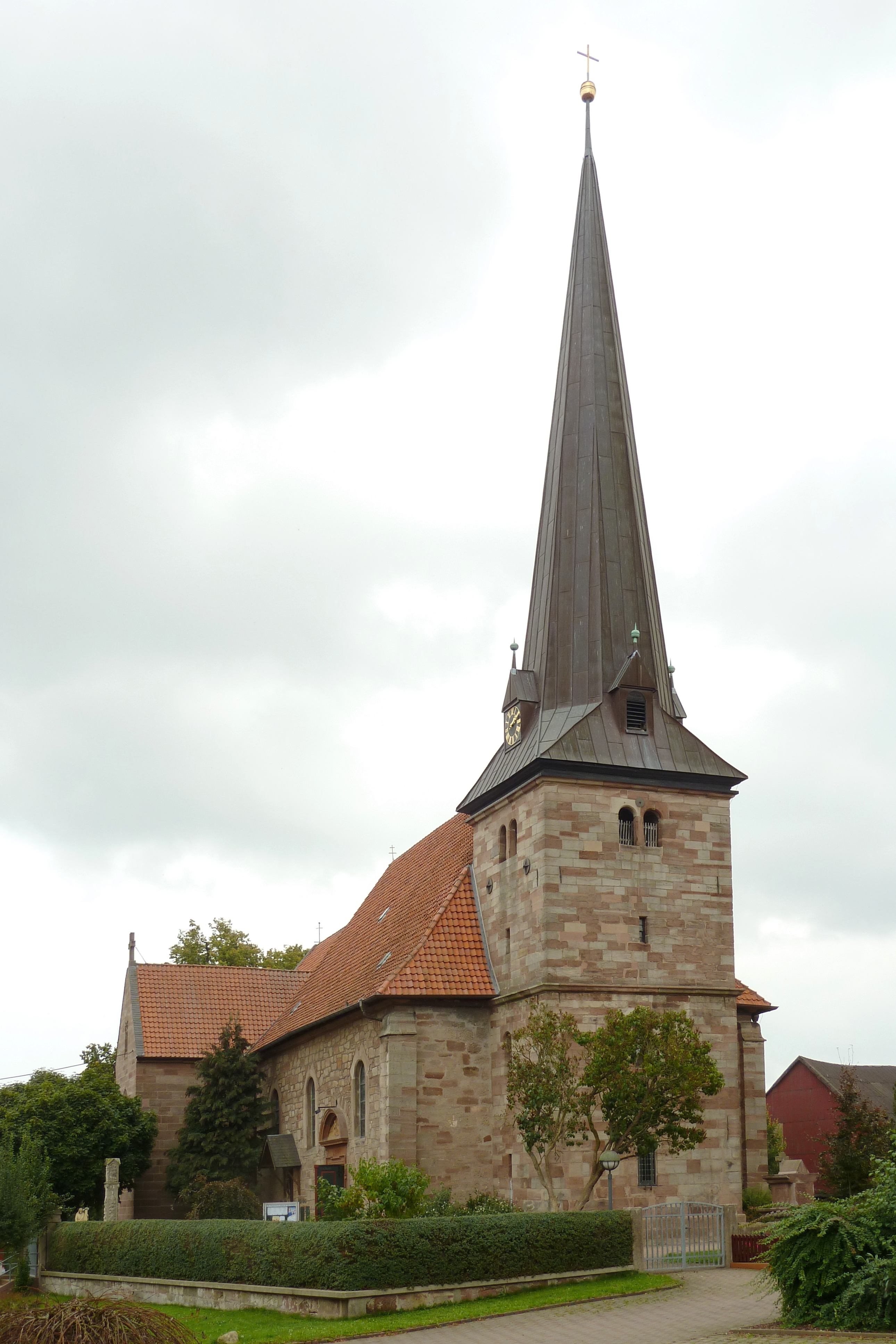 Katholische Kirche St. Johannes Baptist in Seulingen, Landkreis Göttingen, Niedersachsen. Turm mittelalterlich, Kirchenschiff nach Zerstörung im 30jährigen Krieg durch Dominikus Balatt barock neu errichtet, Anbau von neoromanischem Querhaus, Chor und Sakristei 1869.